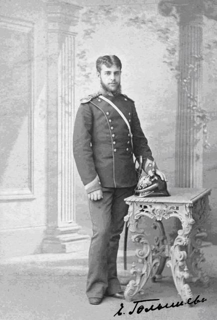 Потомственный почетный гражданин, хорунжий Войска Донского, воевать не пришлось, но форма ему была к лицу, а с годами его все принимали за генерала. см. мемуары Владимира Александровича Челищева (Линденберг).